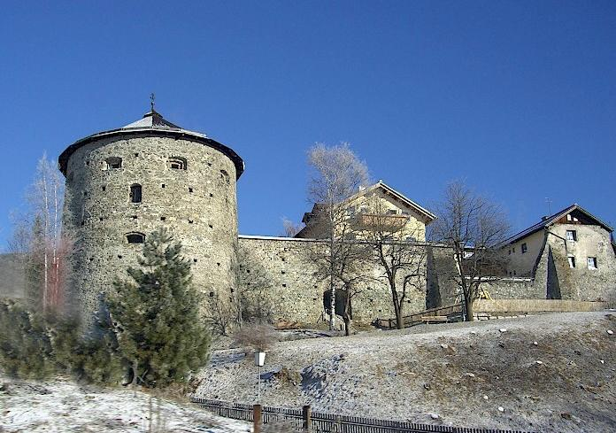 Gerberturm, Stadtturm, Hexenturm; rechts die Stadtmauer bei Hofhaimergasse 11, 9, 7